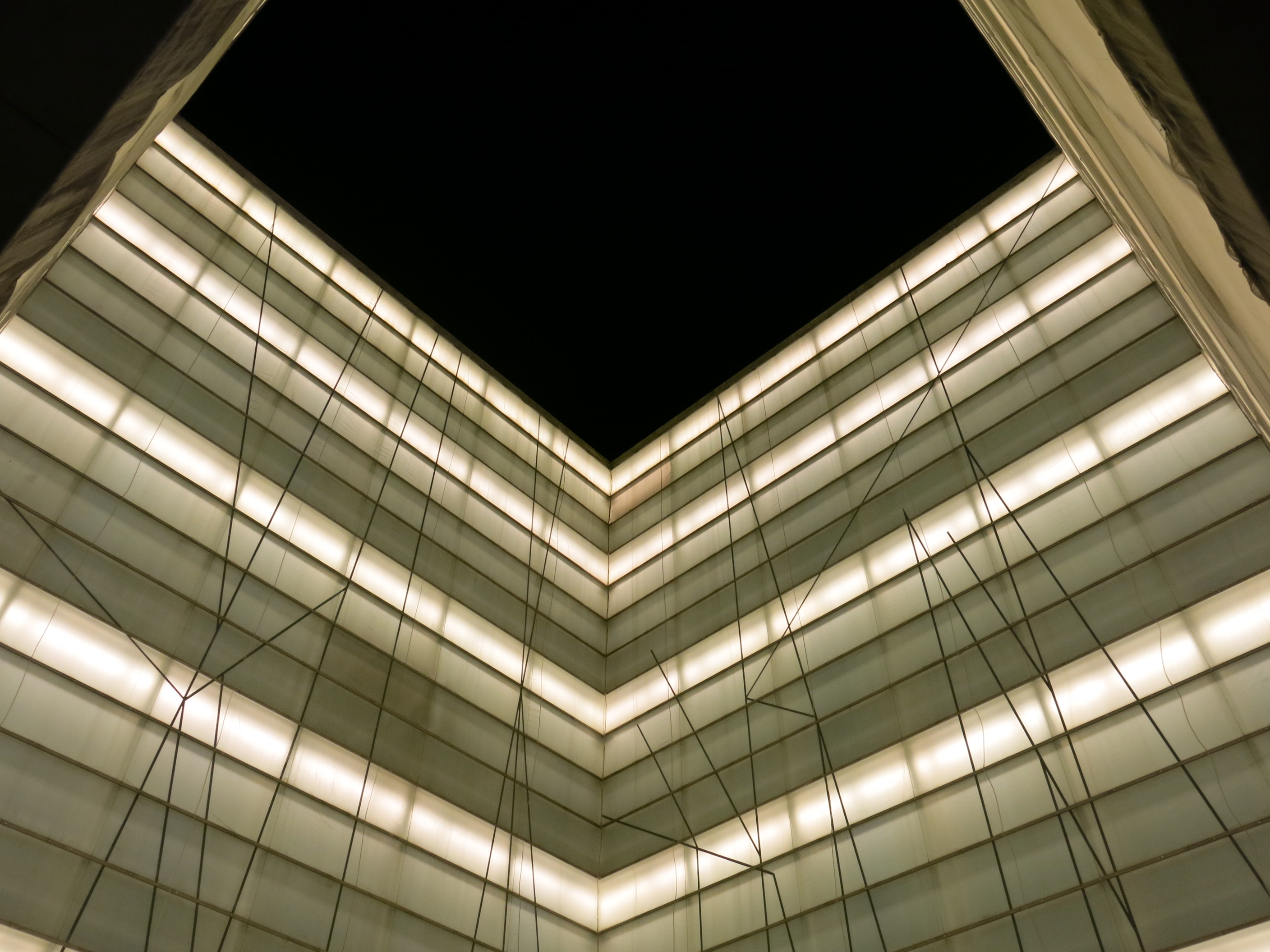 Llanterna, de Pablo Palazuelo, al pati de l'Auditori de Barcelona